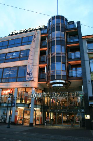 Königsgalerie Kassel Aussenaufnahme